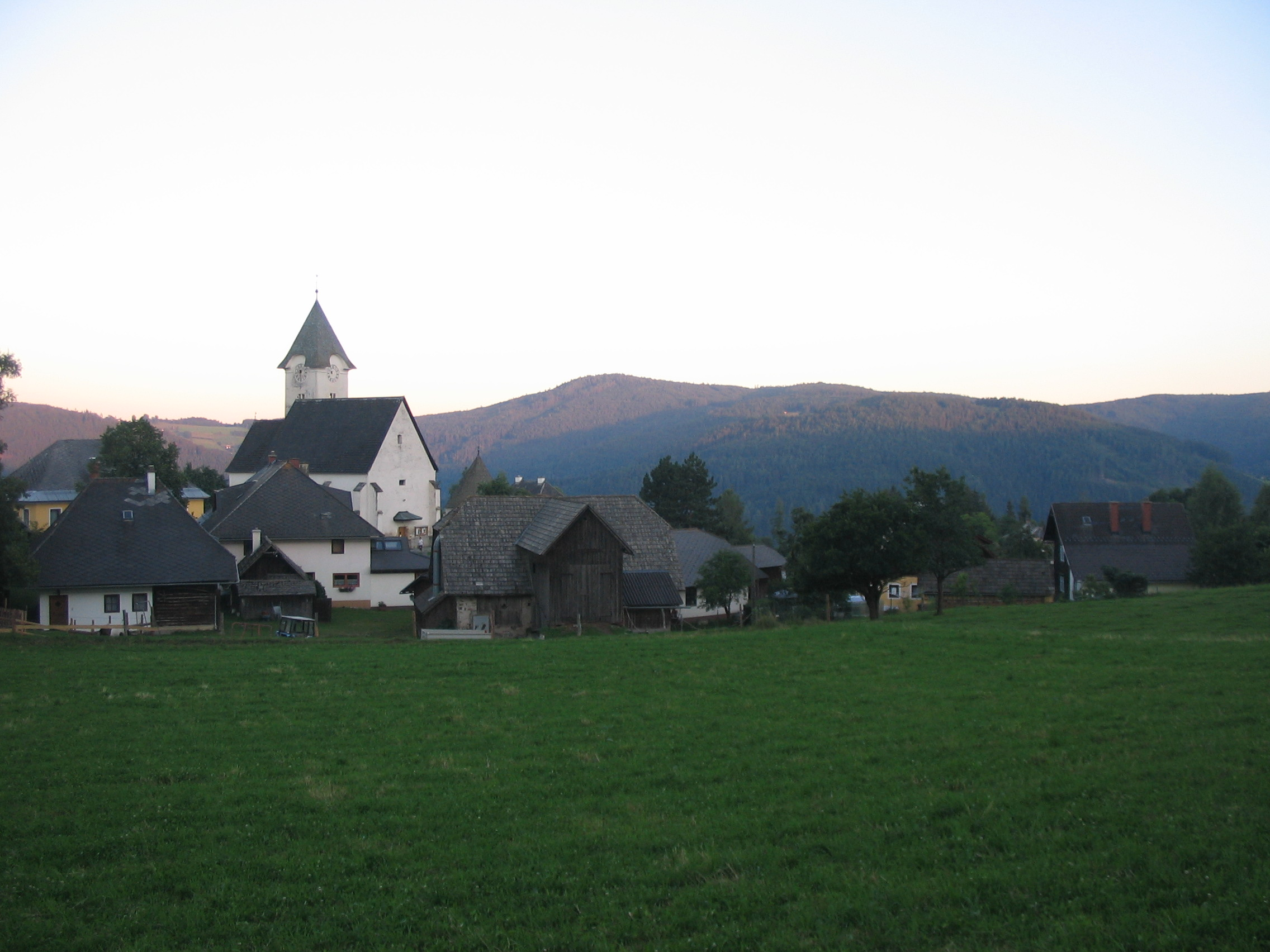 Pfarrkirche hl. Lambert, Pisweg, Gurk, Kärnten.